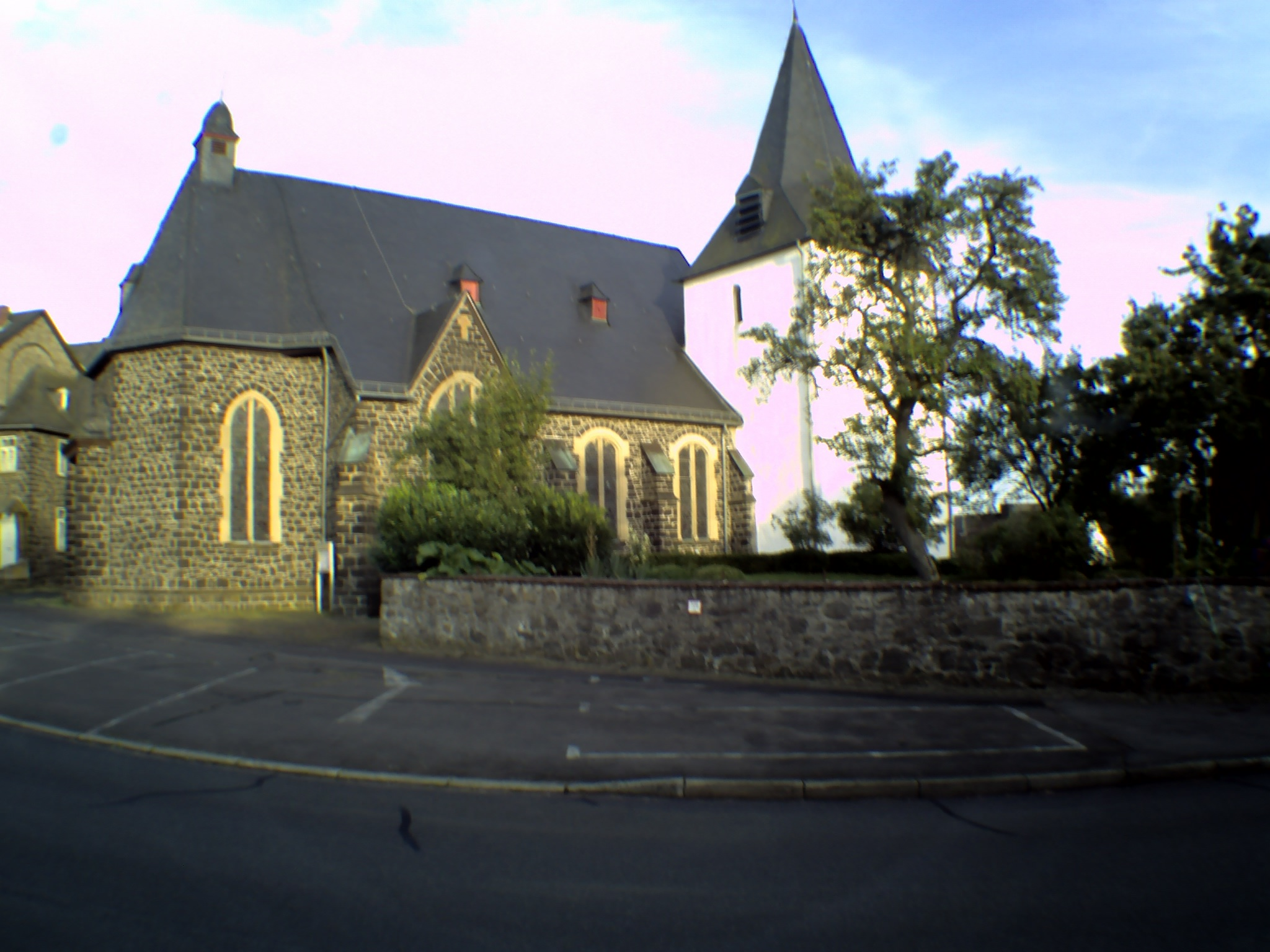 Uess, spätgotische katholische Kirche, erbaut 1528